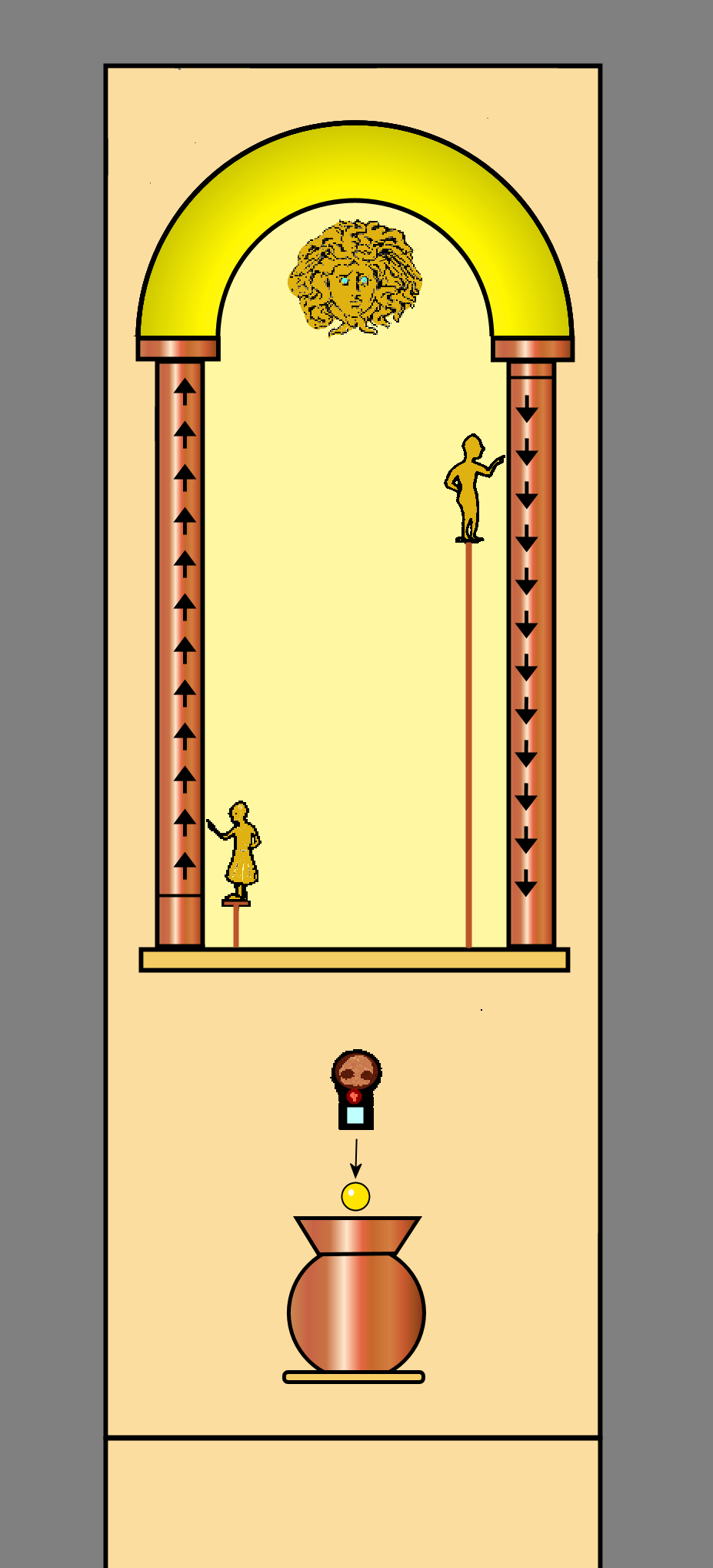 Essai de représentation de l'horloge dite d'Archimède d'après les textes existants.